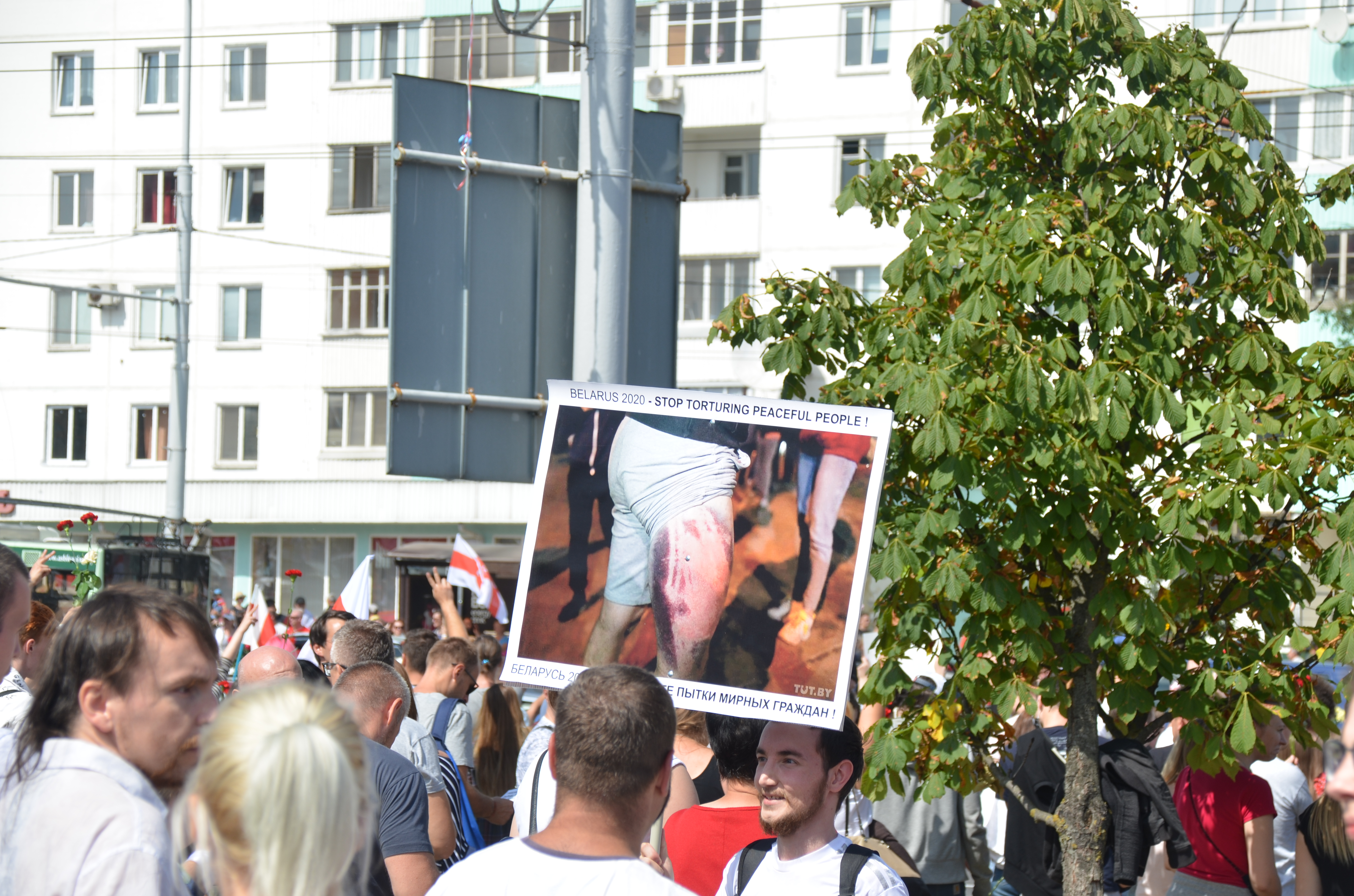 Митинг памяти Александра Тарайковского, метро Пушкинская, Минск, 15 августа 2020